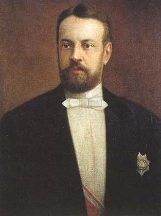 Sergei Witte (1849-1915)